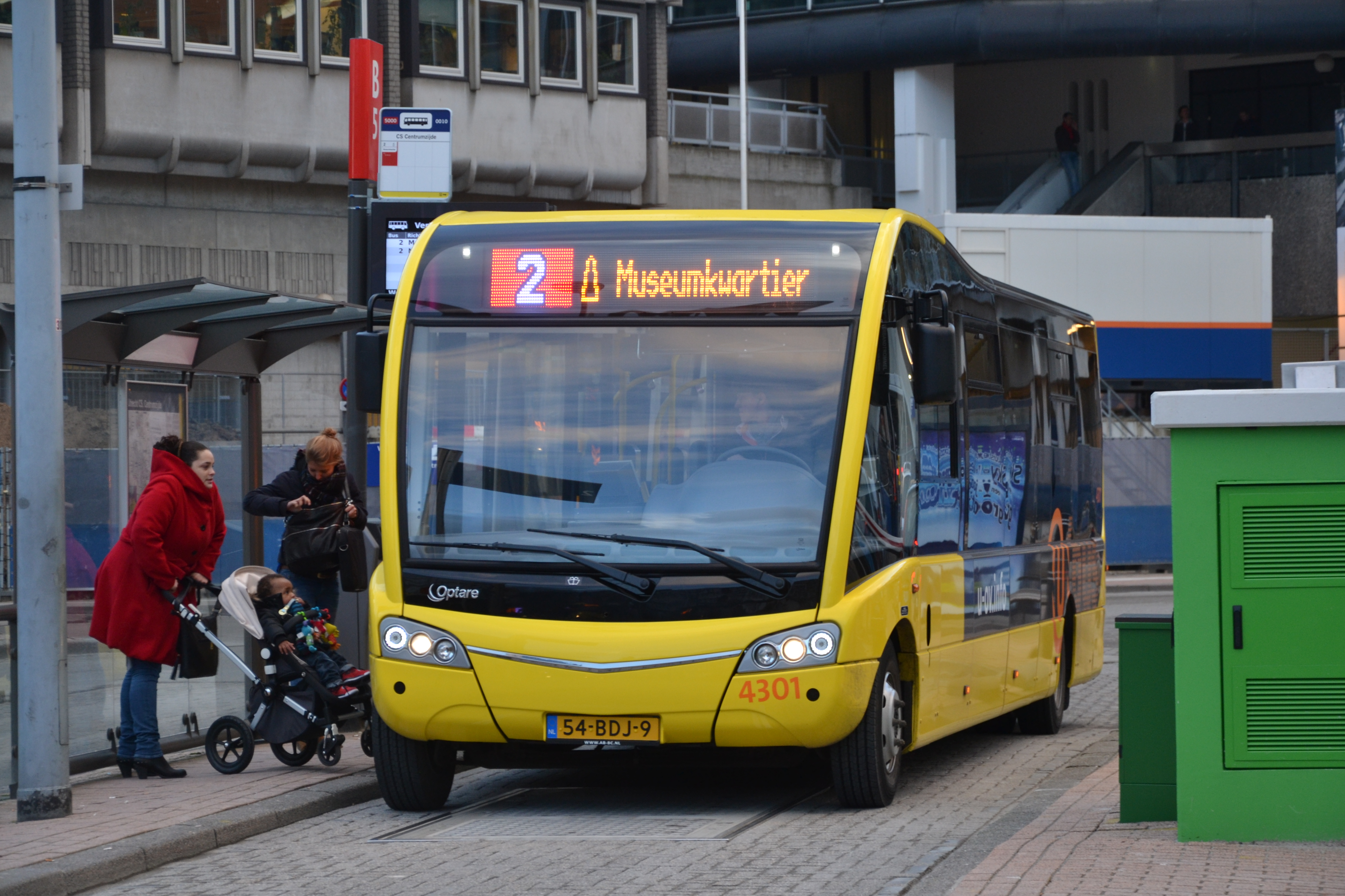 Toen Qbuzz net in Utrecht reed liep ik ze mis, maar een maandje later heb ik ze nu eindelijk in actie gezien: de elektrische Optares voor de Utrechtse lijn 2. En god, wat zijn ze stil, een schel contrast met de Van Hooltjes die er iets meer dan een maand geleden nog reden.. Op de foto is de 4301 te zien, vlak voor vertrek van het busstation Centrumzijde.